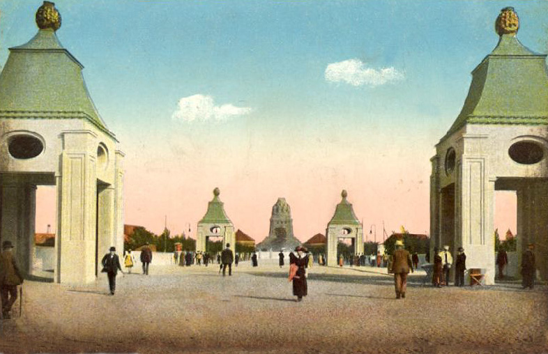 Internationale Baufach-Ausstellung 1913 Leipzig, Brücke in der Hauptallee (Straße des 18. Oktober)